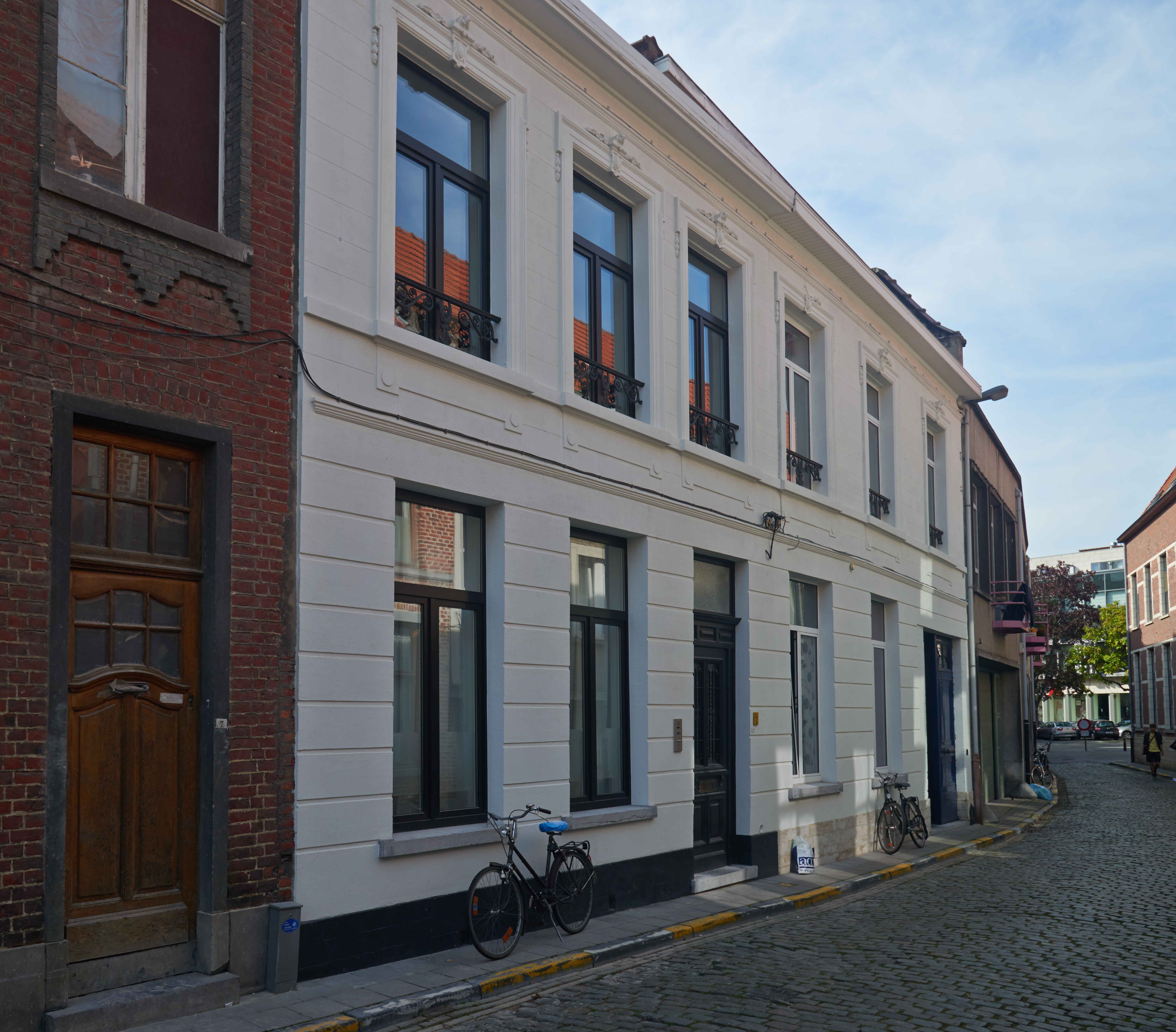 Leuven, Augustijnenstraat 9 (midden links)